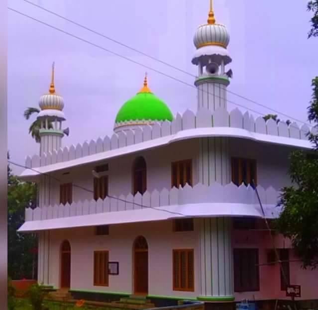 കാരൂർ ജുമാ മസ്ജിദ്